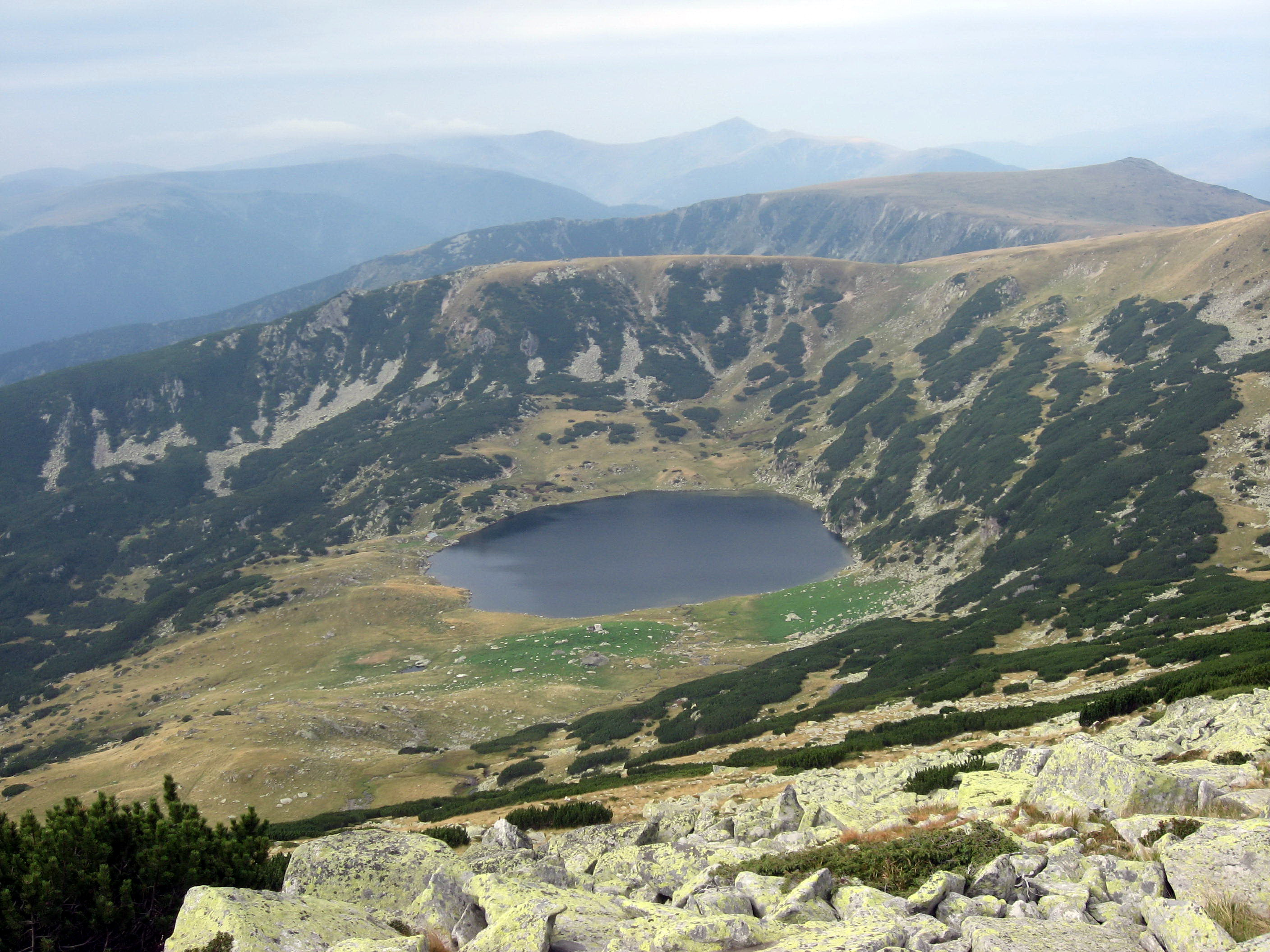 Jezero Zanoaga